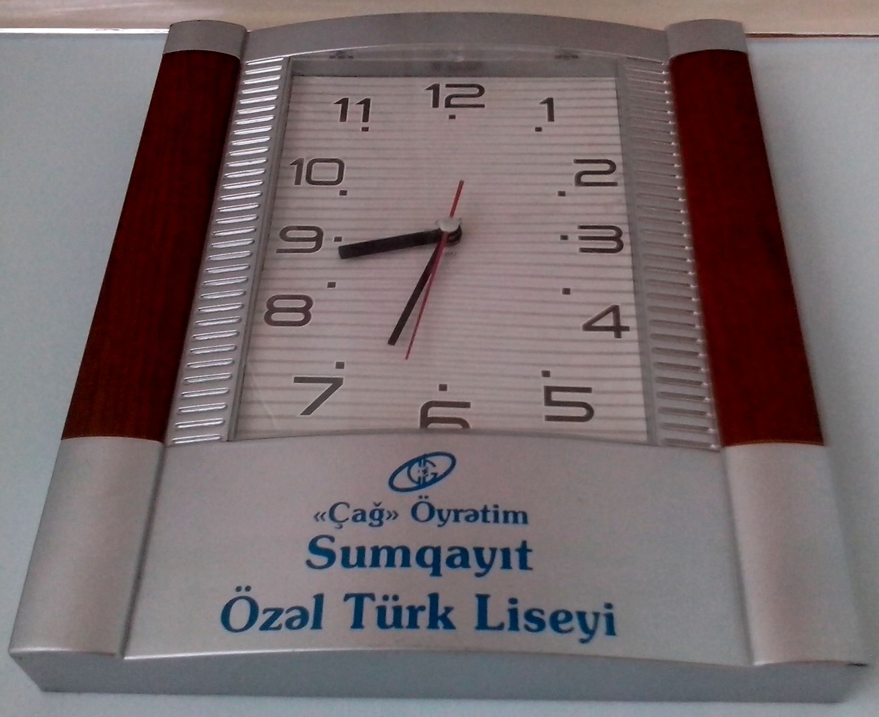 SÖTL-saat